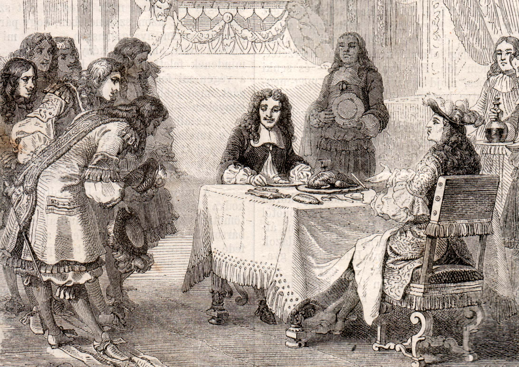 Molière életéről szóló cikk illusztrációja: A kitüntetett Molière a királlyal ebédel